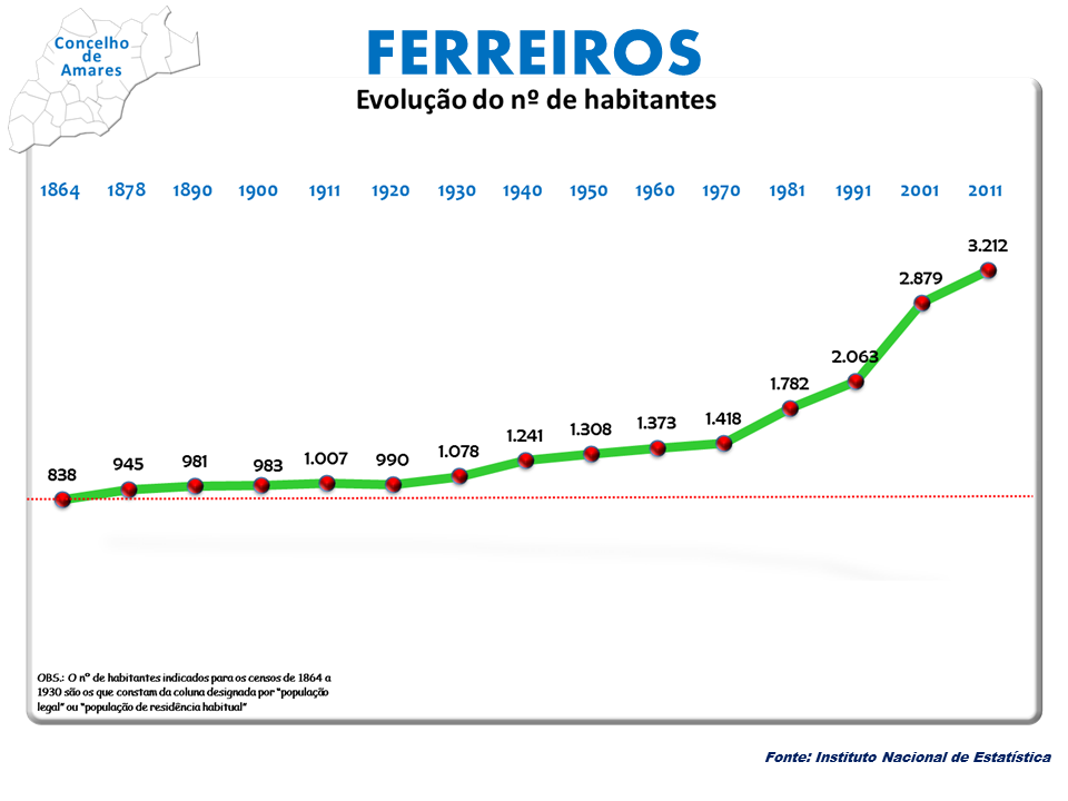 Censo 2011